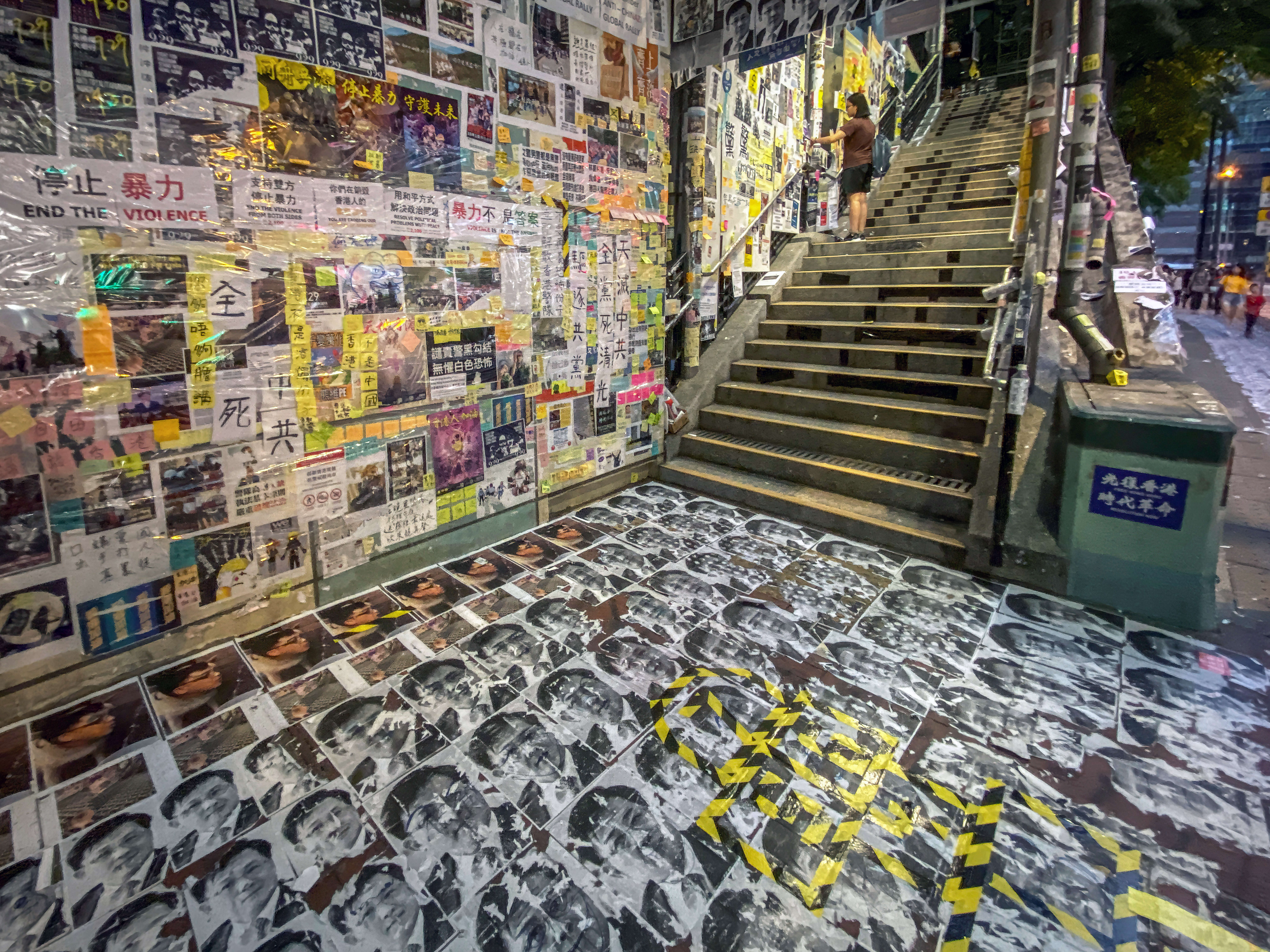 IMG_0794-edit